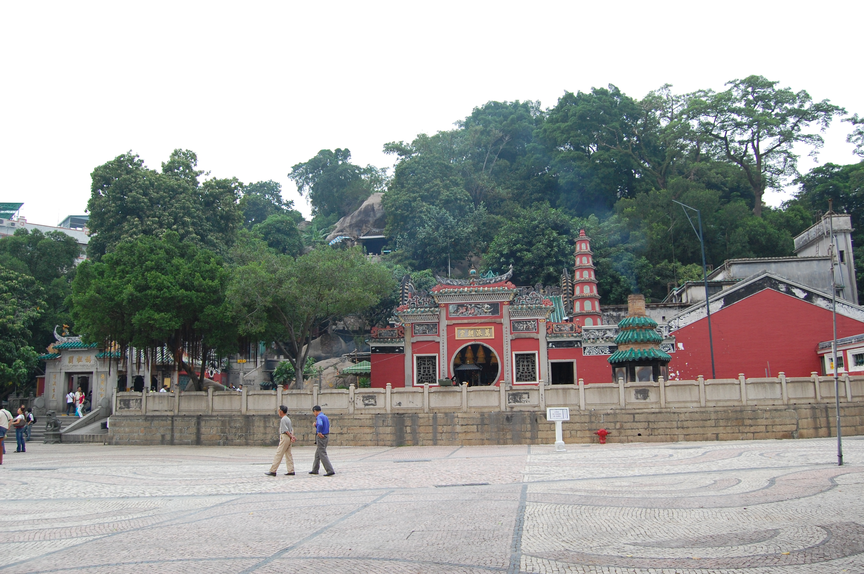 A-Ma Temple